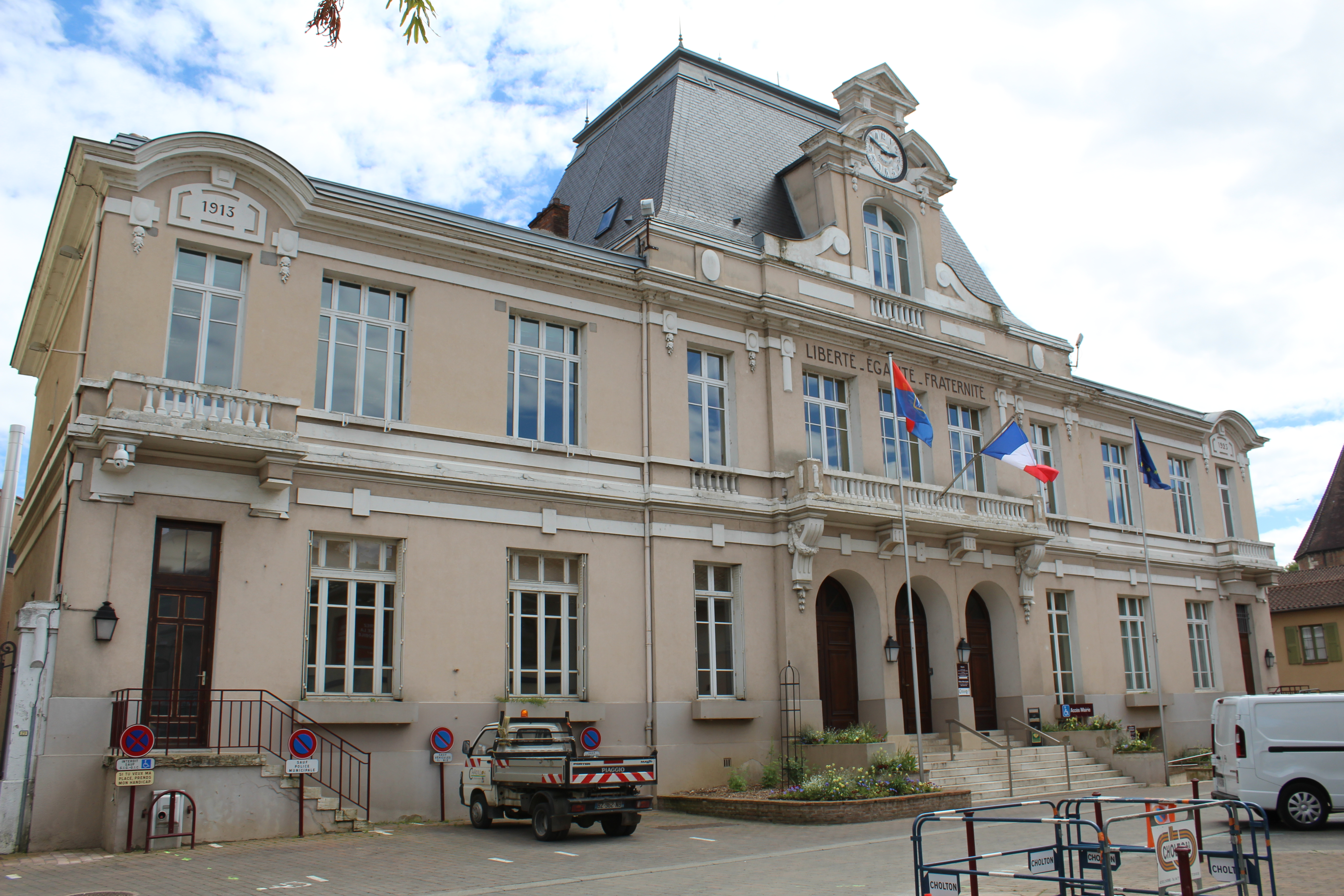 Hôtel de ville de Châtillon-sur-Chalaronne.